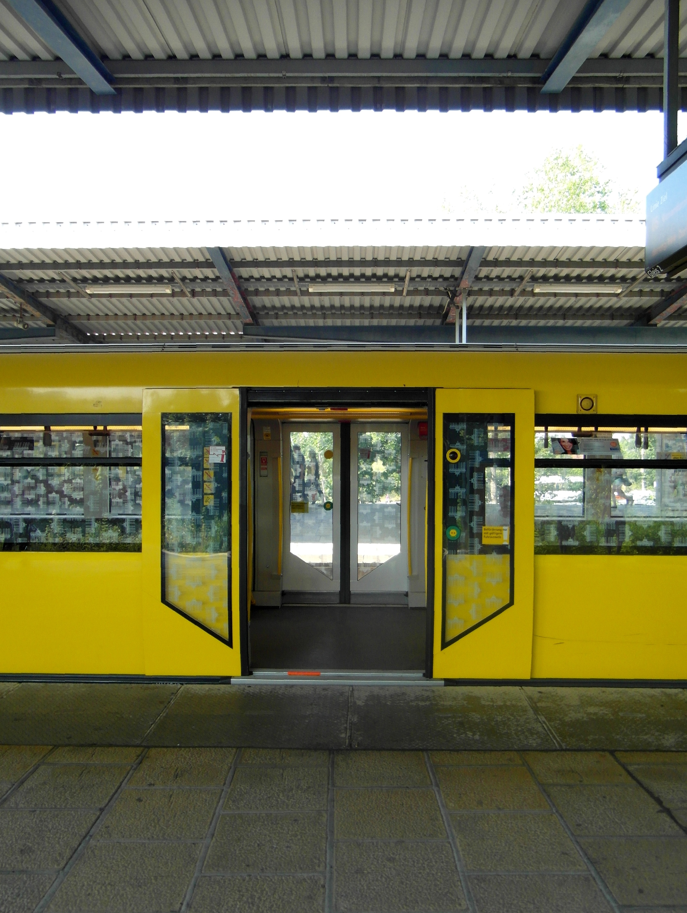 Ein gemeinsamer Bahnhof mit bahnsteiggleichem Übergang zwischen S- und U-Bahn - Linien S5 und U5